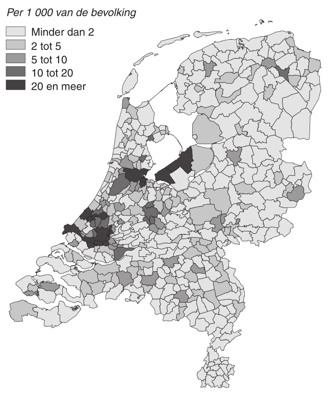 Spreiding van de Hindoestanen in Nederland